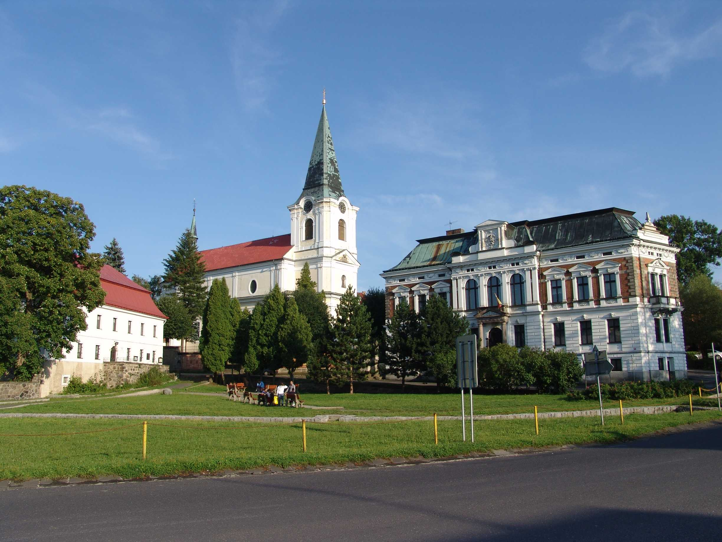 Zentrum von Jiříkov